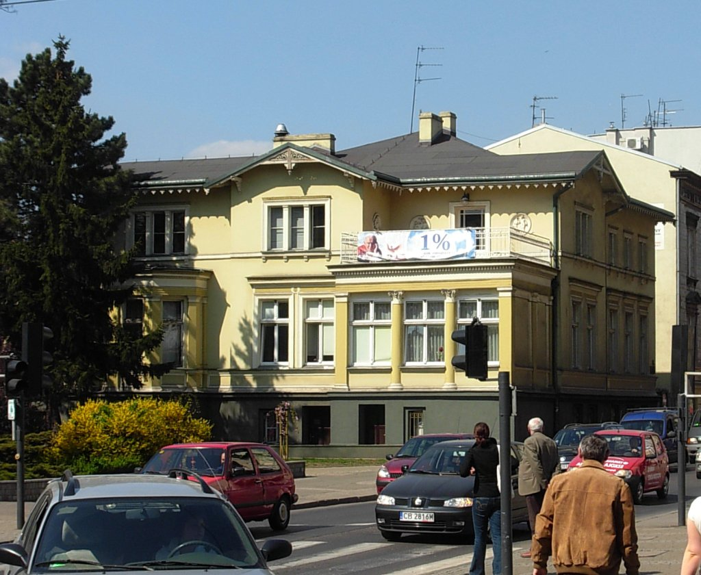 Willa Luisa Aronsohna, ul. Śniadeckich 1 róg Gdańskiej w Bydgoszczy